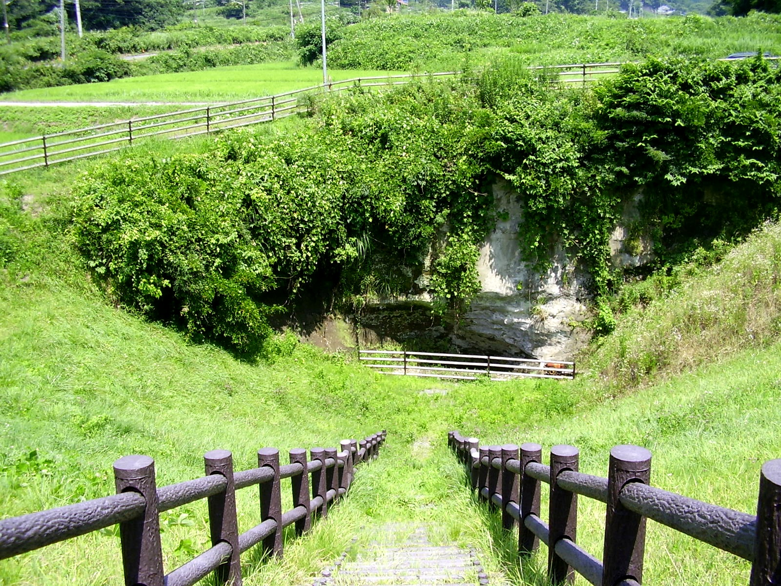 宮城県宮城郡松島町にある、品井沼の干拓を目的として開削された元禄潜穴を施工した際に掘られた竪穴の跡。「ずり出し穴」と呼ばれる。撮影日 2011年8月9日